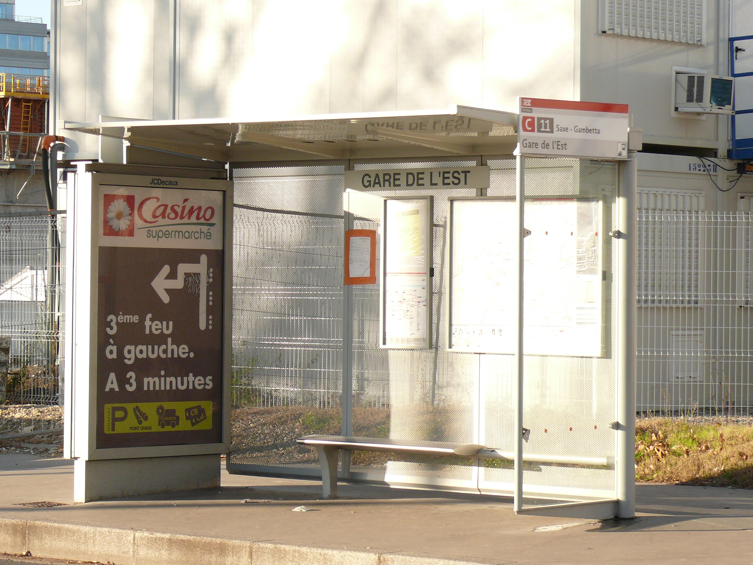 Aubette de l’arrêt "Gare de l'Est" de Lyon